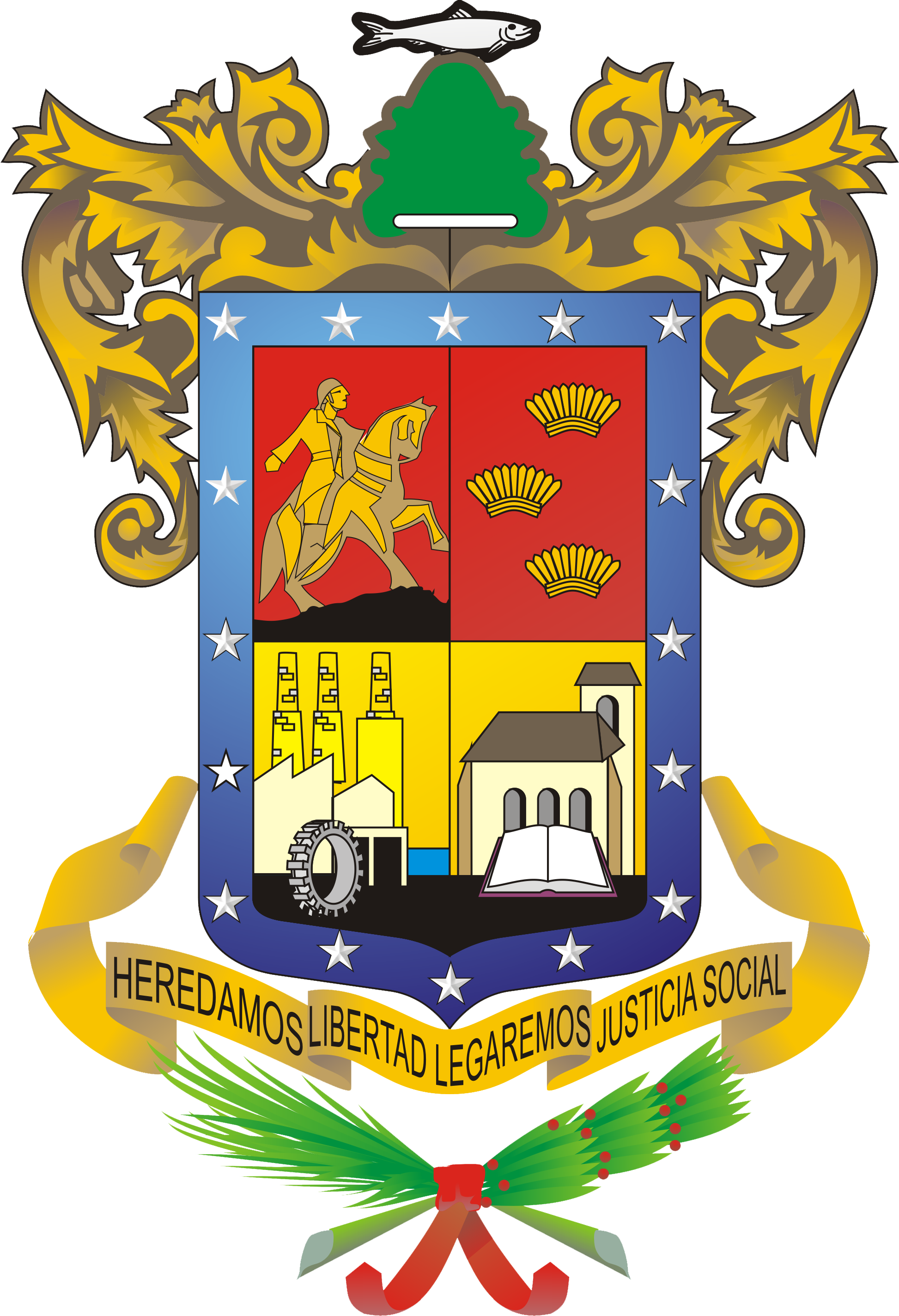 Escudo de armas del estado de Michoacán de Ocampo (México)